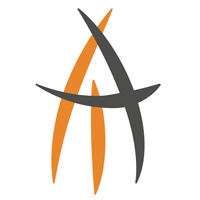 Logo de la Fundació Casa Asil de Sant Andreu de Palomar